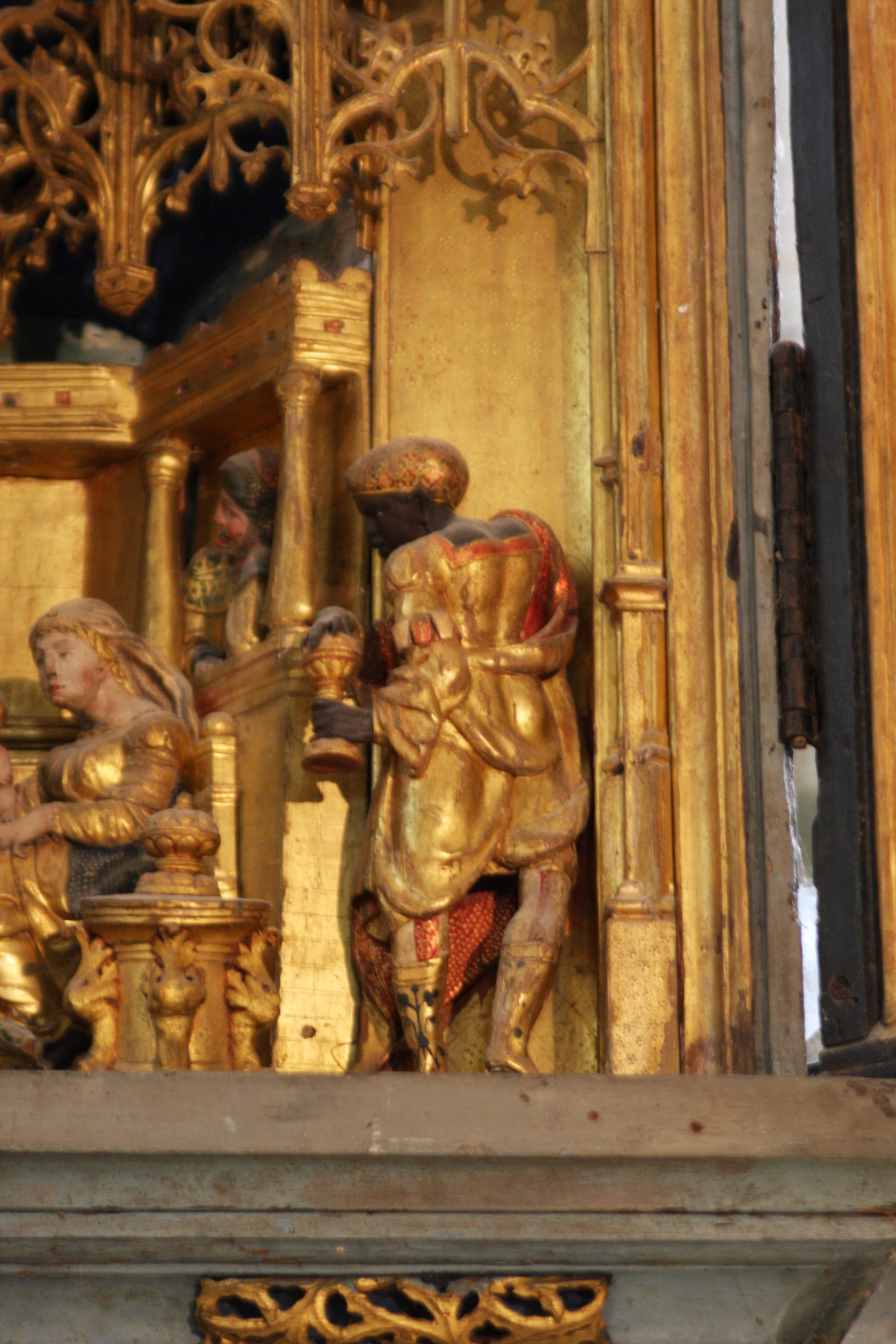 Figure de Balthazar dans la scène de l'adoration des mages du retable anversois de l'abbaye de Baume-les-Messieurs